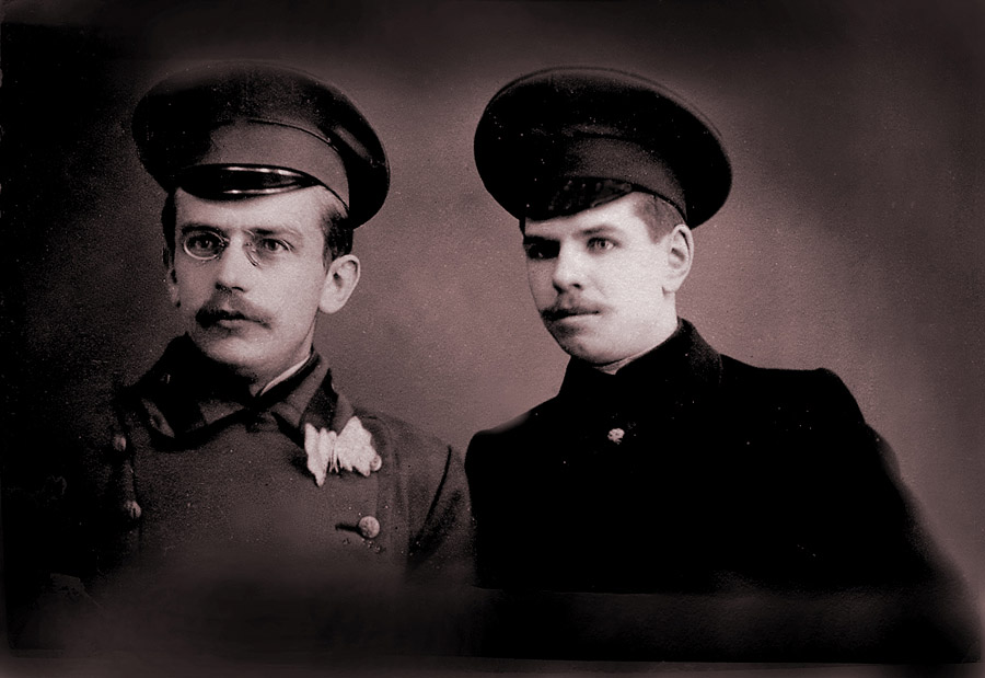 Беларуская (тарашкевіца): Павал Растаргуеў у студэнцкія гады